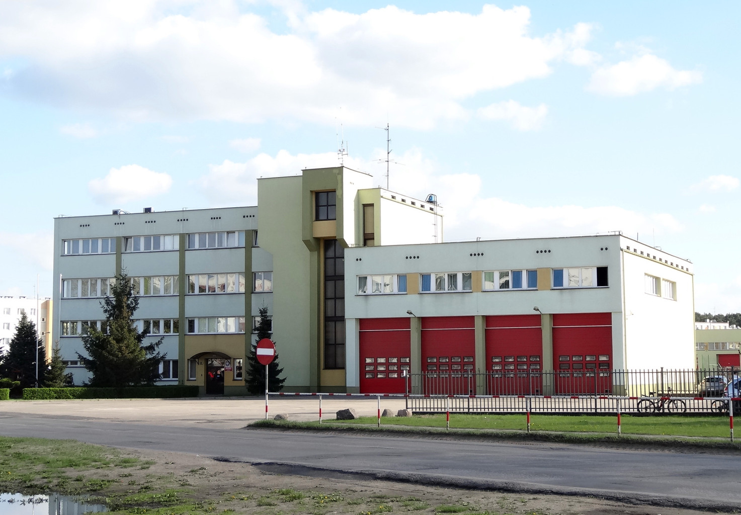 Szkoła Podoficerska Państwowej Straży Pożarnej przy ul. Glinki w Bydgoszczy